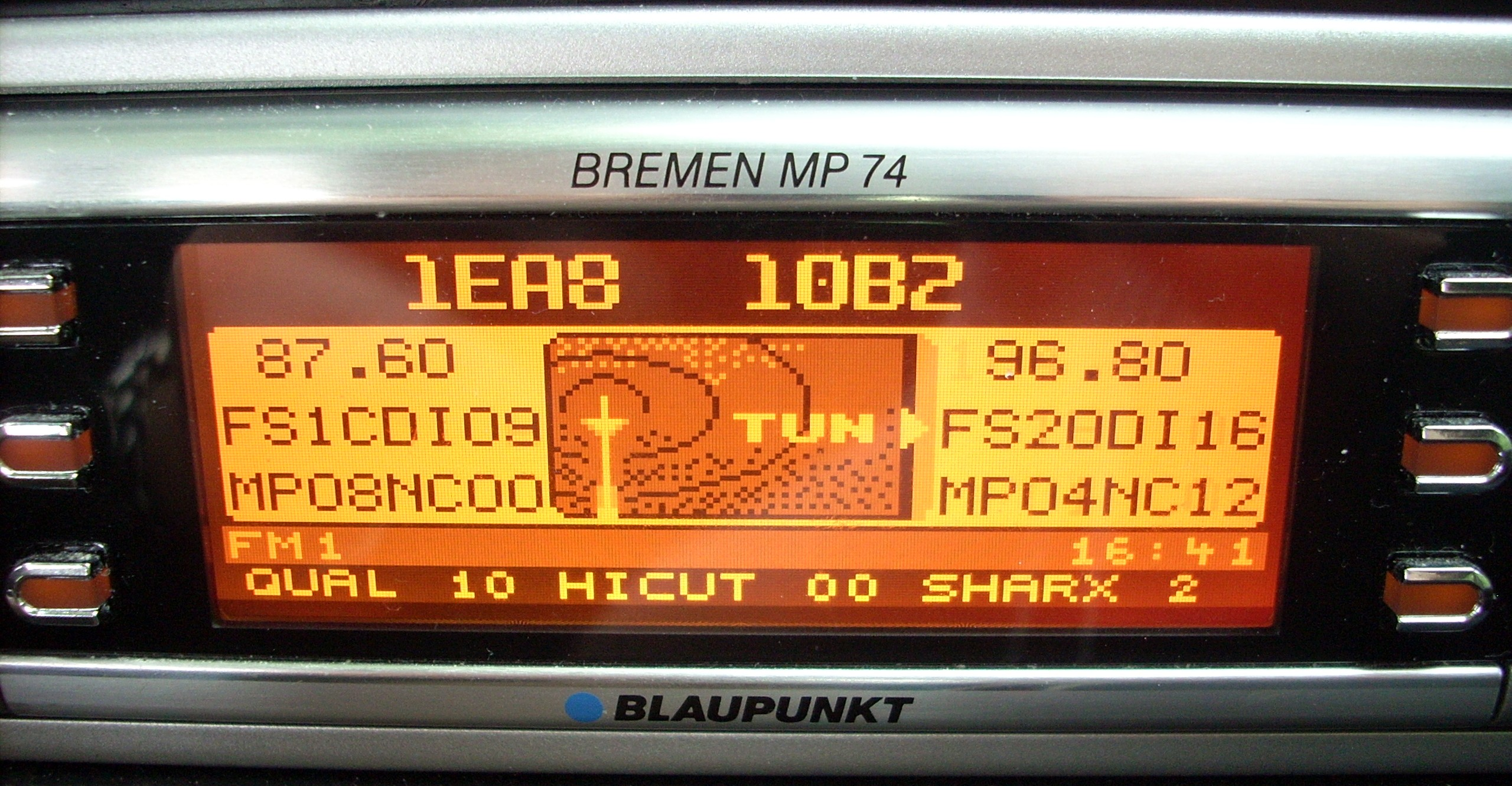 Servicemenü des Blaupunkt Bremen MP74 (Aktivierung: Gerät mit gedrückter "Programm1"- und "Menü"-Taste einschalten). Aktuelle Frequenz: 87,60 MHz (Radio Idar-Oberstein, Sender Idar-Oberstein/Hillschied, PI-Code 1EA8); aktuelle Suchlauffrequenz: 96,80 MHz (bigFM Saarland, Sender Friedrichsthal/Hoferkopf, PI-Code 10B2)